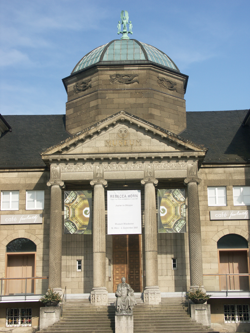 Museum Wiesbaden, Hessisches Landesmuseum